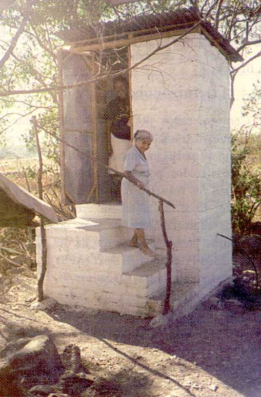 Letrina abonera terminada Regón Paracentral de El Salvador Programa de Higiene Bàsica y Salud financiado por la Unión Europea 1994 - 1998 Autor: Alfredo Bianco (Basic translation: Finished latrine, El Salvador, Health and Basic Hygiene Program financed by the European Union, 1994-1998, author: Alfredo Bianco)